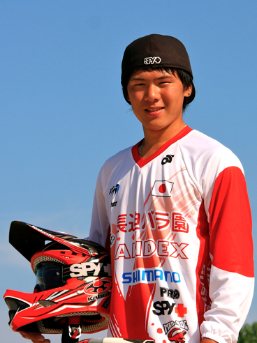 長迫 吉拓